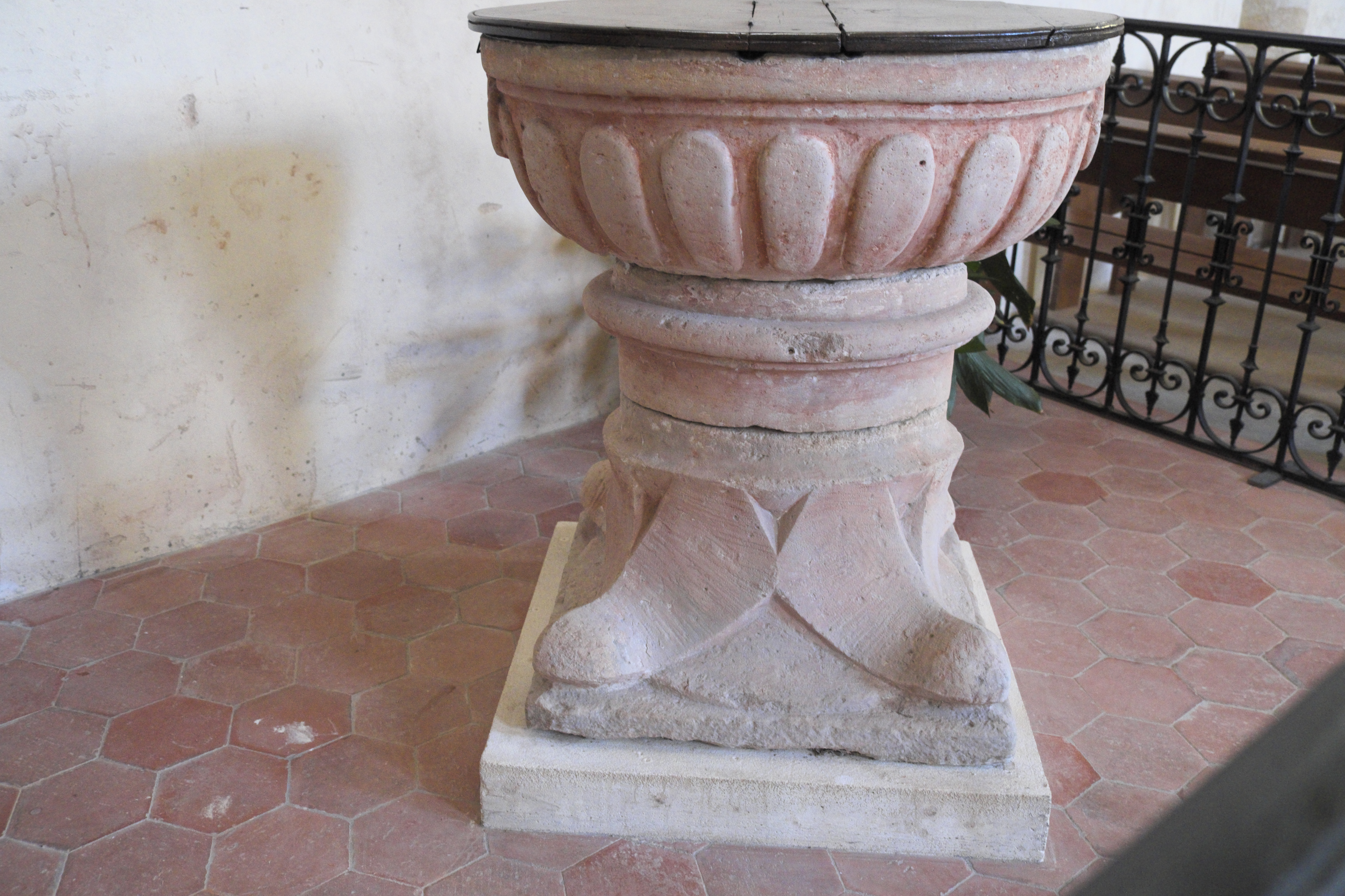 Katholische Pfarrkirche Saint-Clair in Gometz-le-Châtel im Département Essonne (Île-de-France/Frankreich), Taufbecken aus dem 17. Jahrhundert